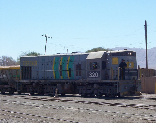 Locomotora Ferronor 320 entrando a estación Baquedano proveniente de Coya Sur. Locomotora General Electric U9C.